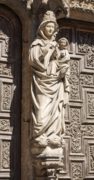 unidentified Spain